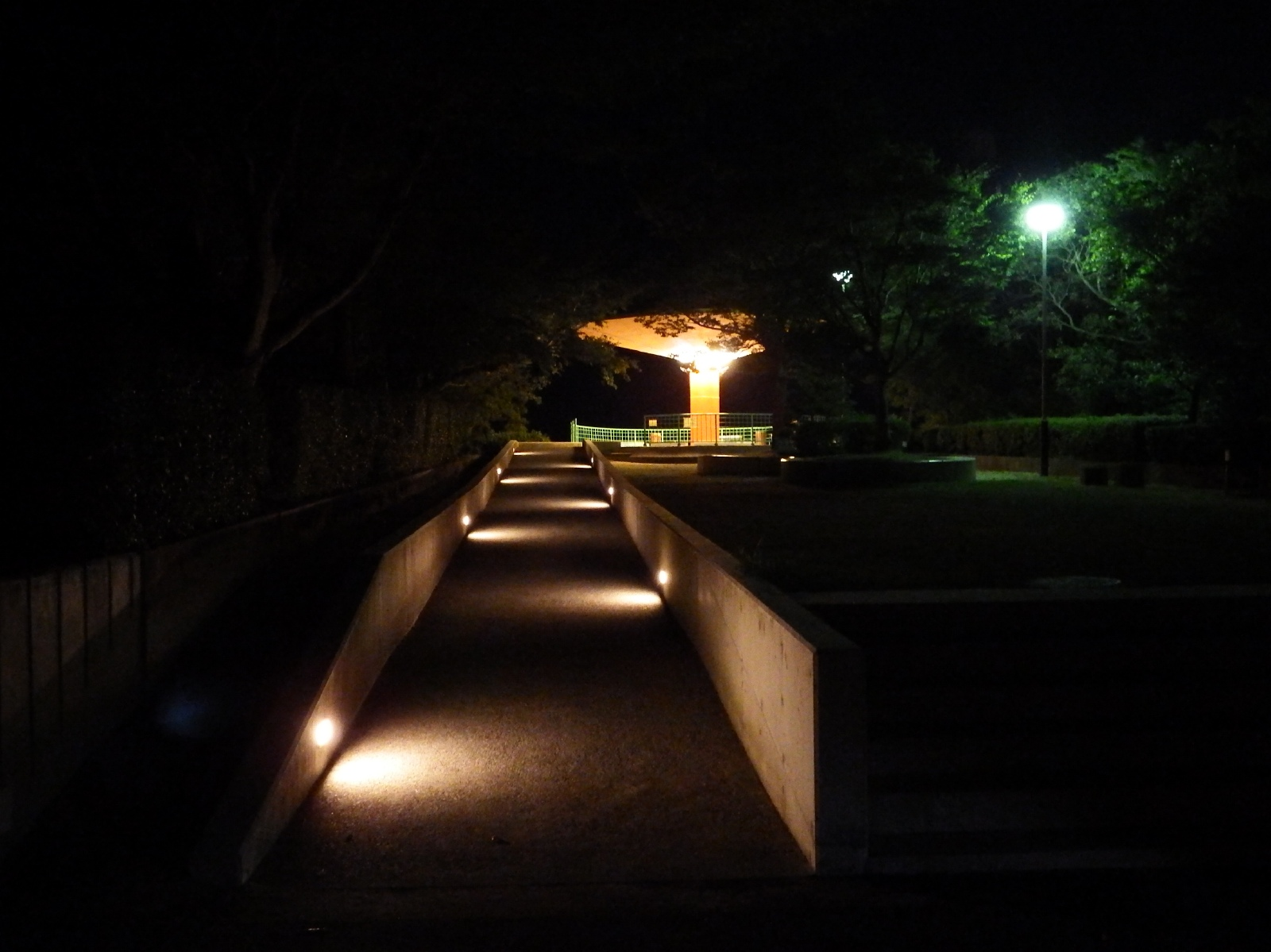 具定展望台